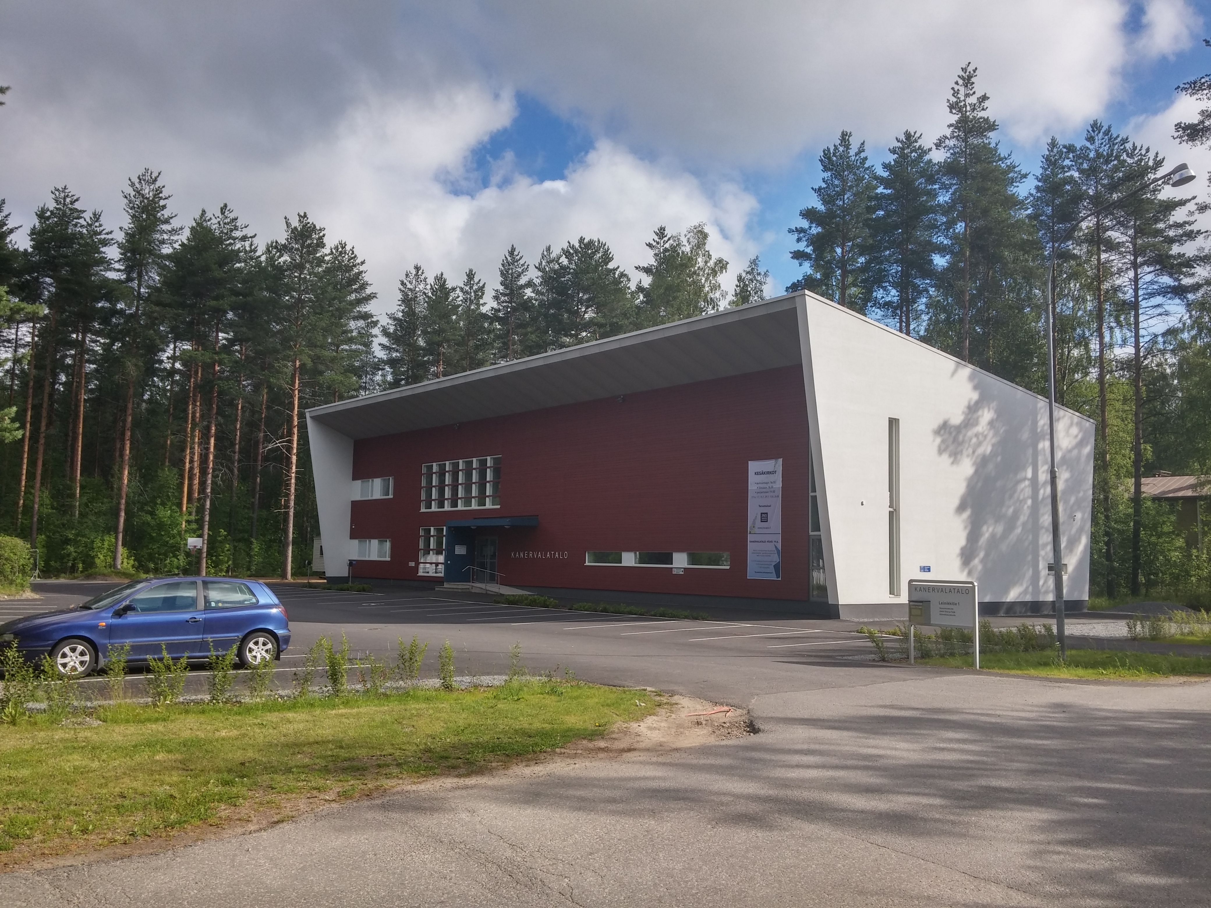 Joensuun vapaaseurakunnan Kanervalatalo Joensuussa